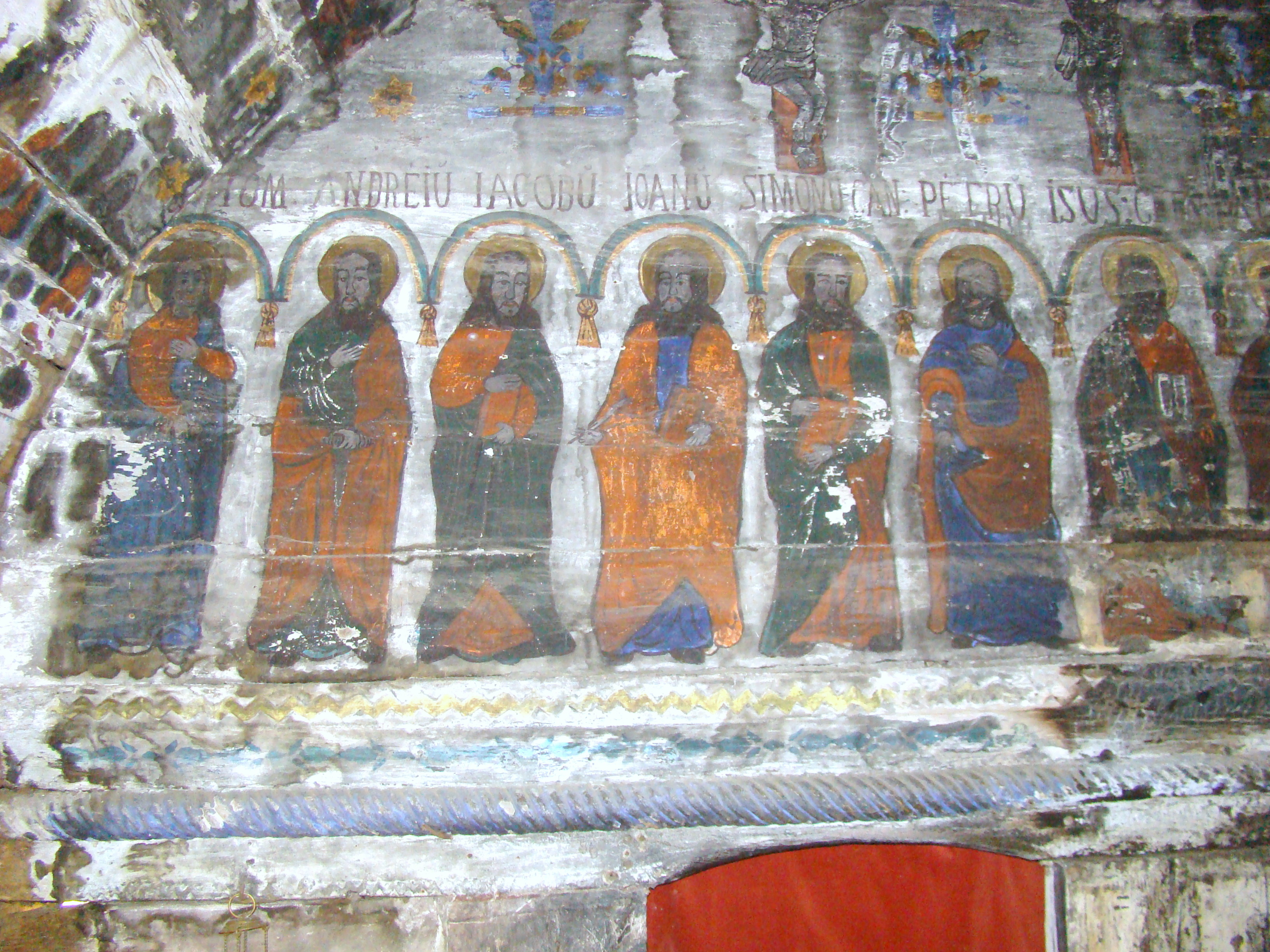 Iconostas, detaliu. Biserica de lemn "Sfinții Arhangheli Mihail şi Gavriil, sat CALNA; comuna VAD, județul Cluj